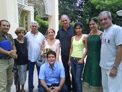 MaríaELL1